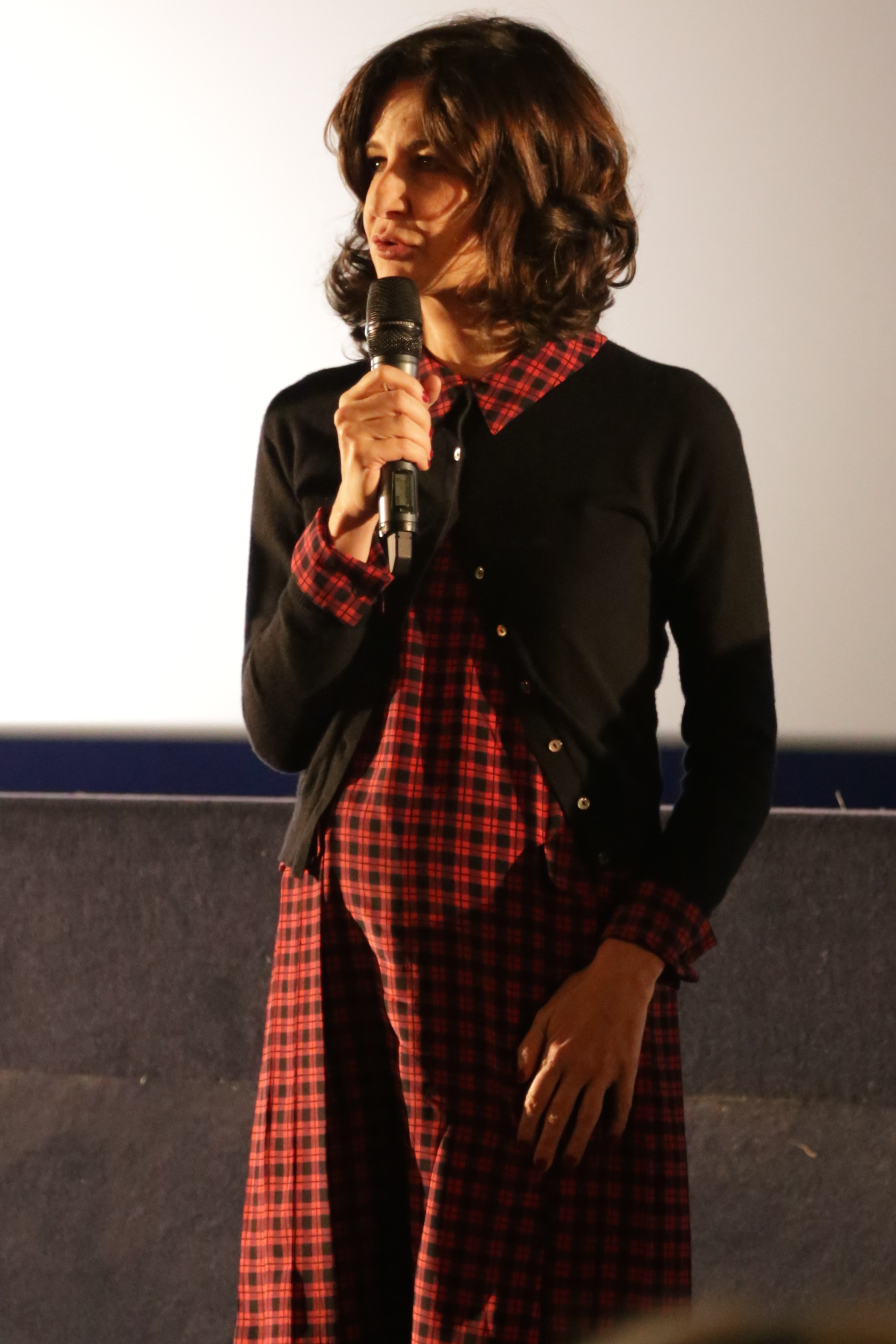 lors de l'avant 1er du film 100% Cachemire